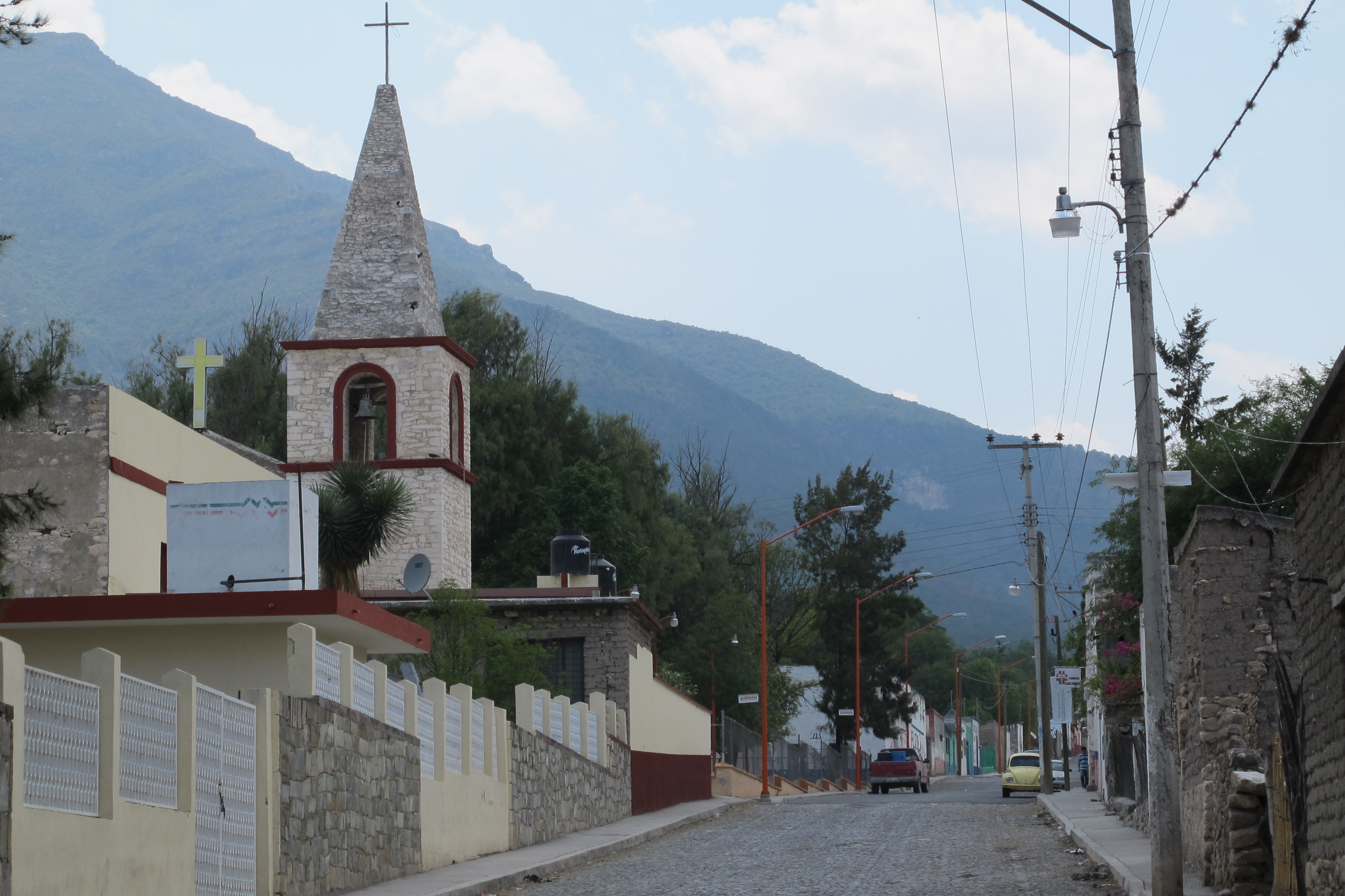 Templo de San Miguel Arcángel y calle de Bustamante Tamaulipas, México